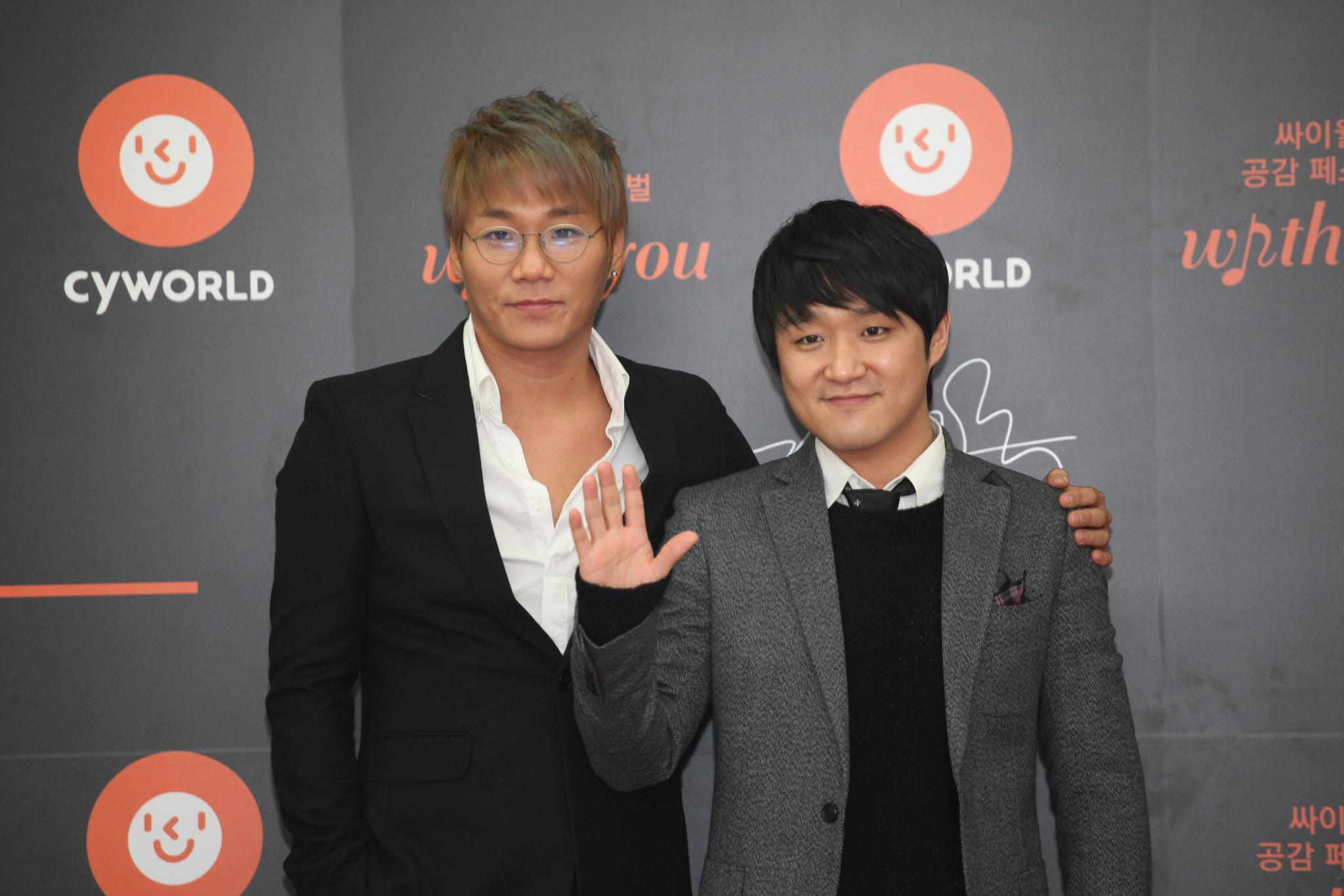 싸이월드 공감 페스티벌_032